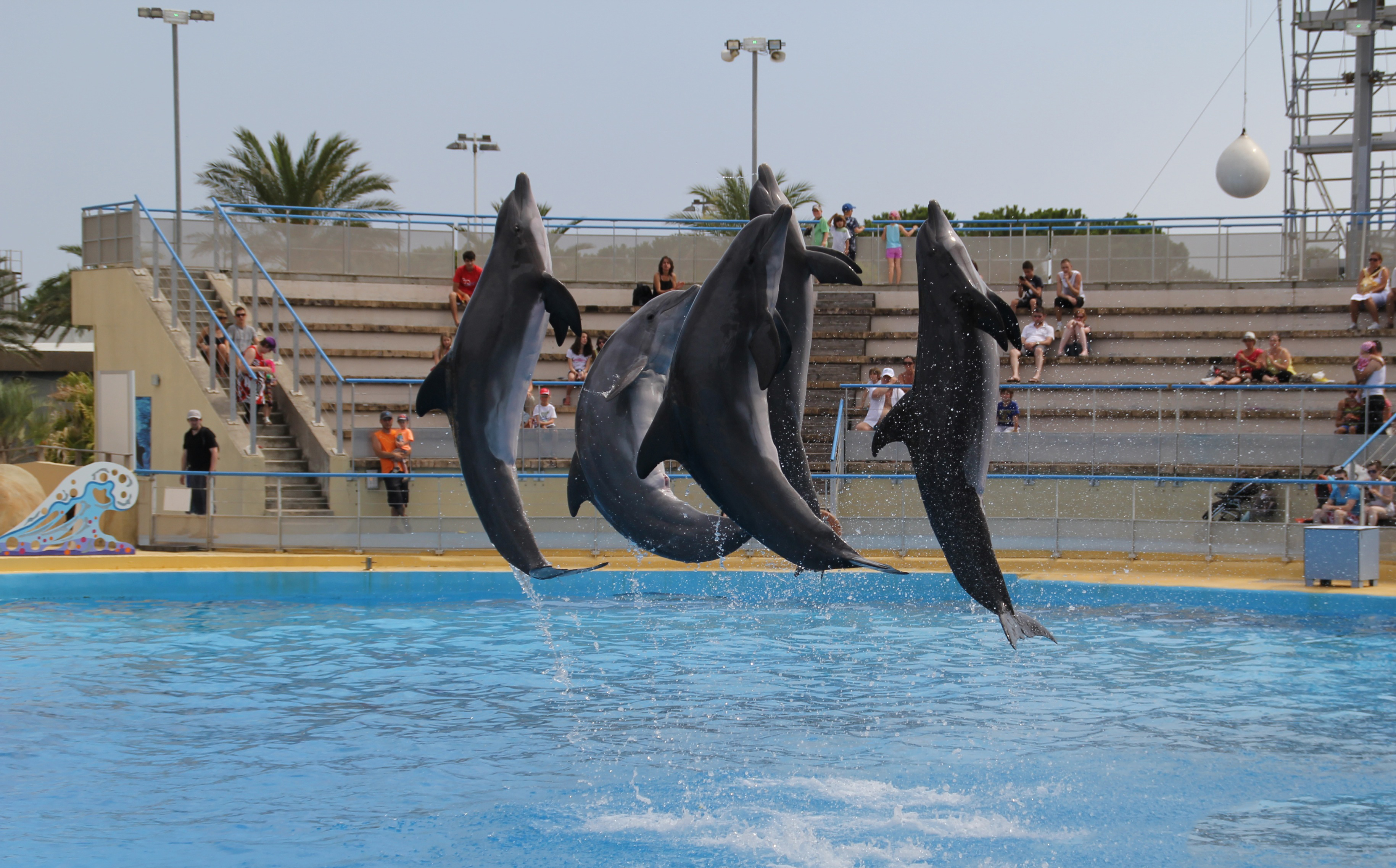 Grands dauphins du Marineland d'Antibes